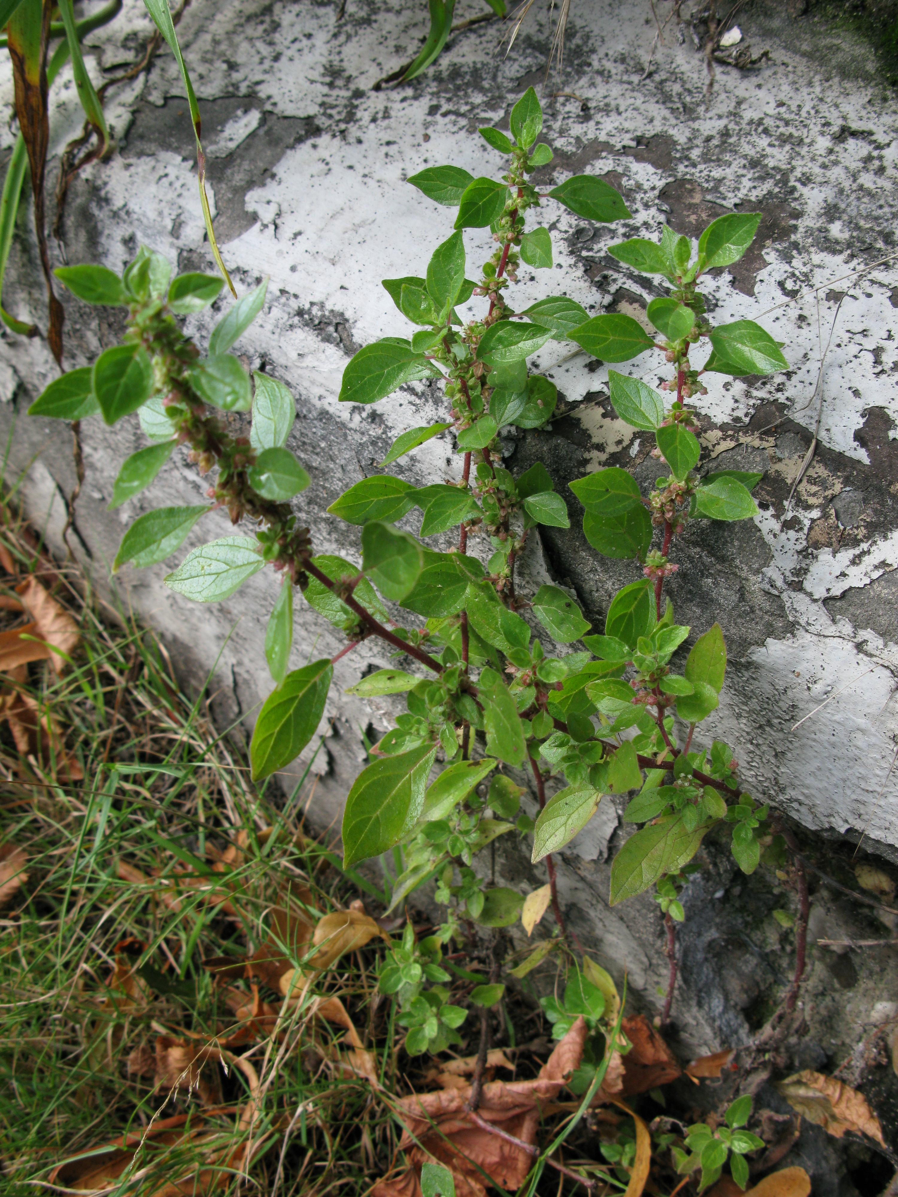 Hamburg